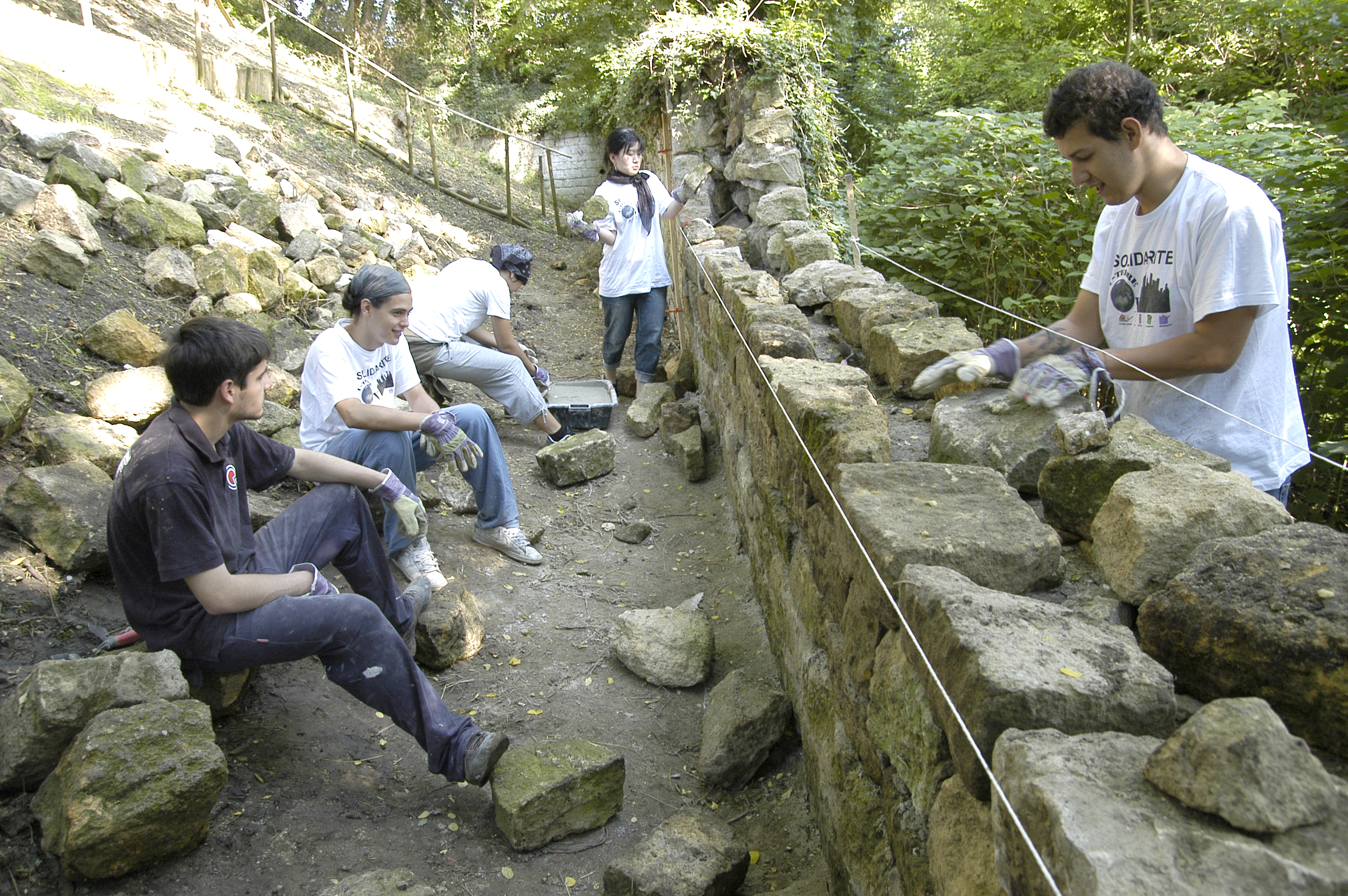 Chantier international de jeunes réparant un mur d'enceinte de la Redoute de la Butte-Pinson à Montmagny (95) France